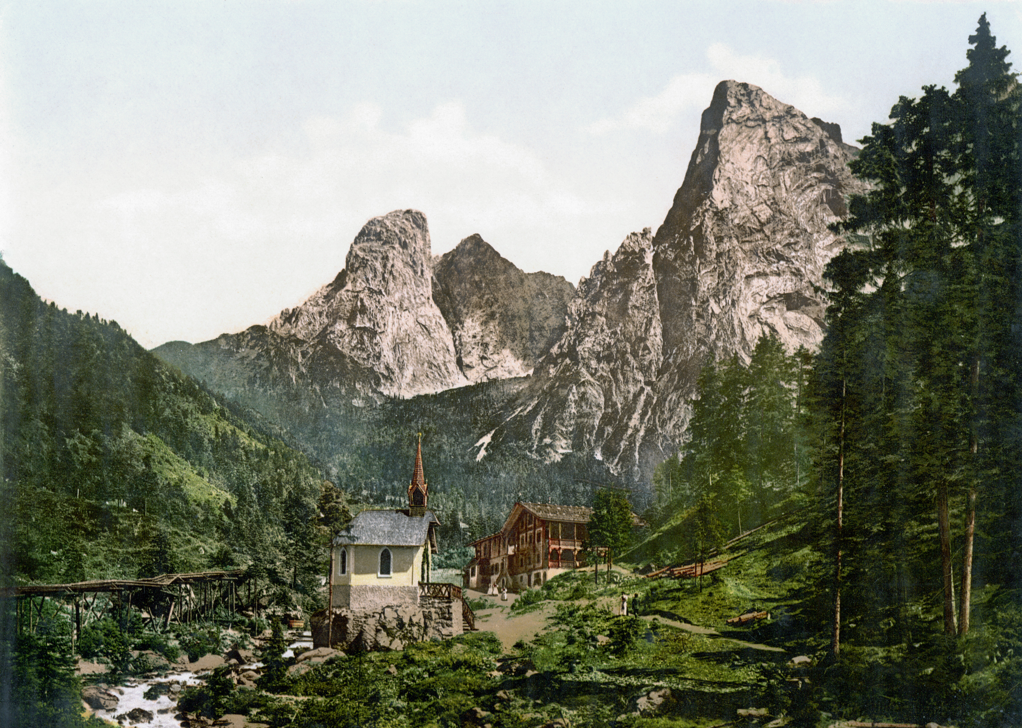 Hinterbaerenbad um 1900